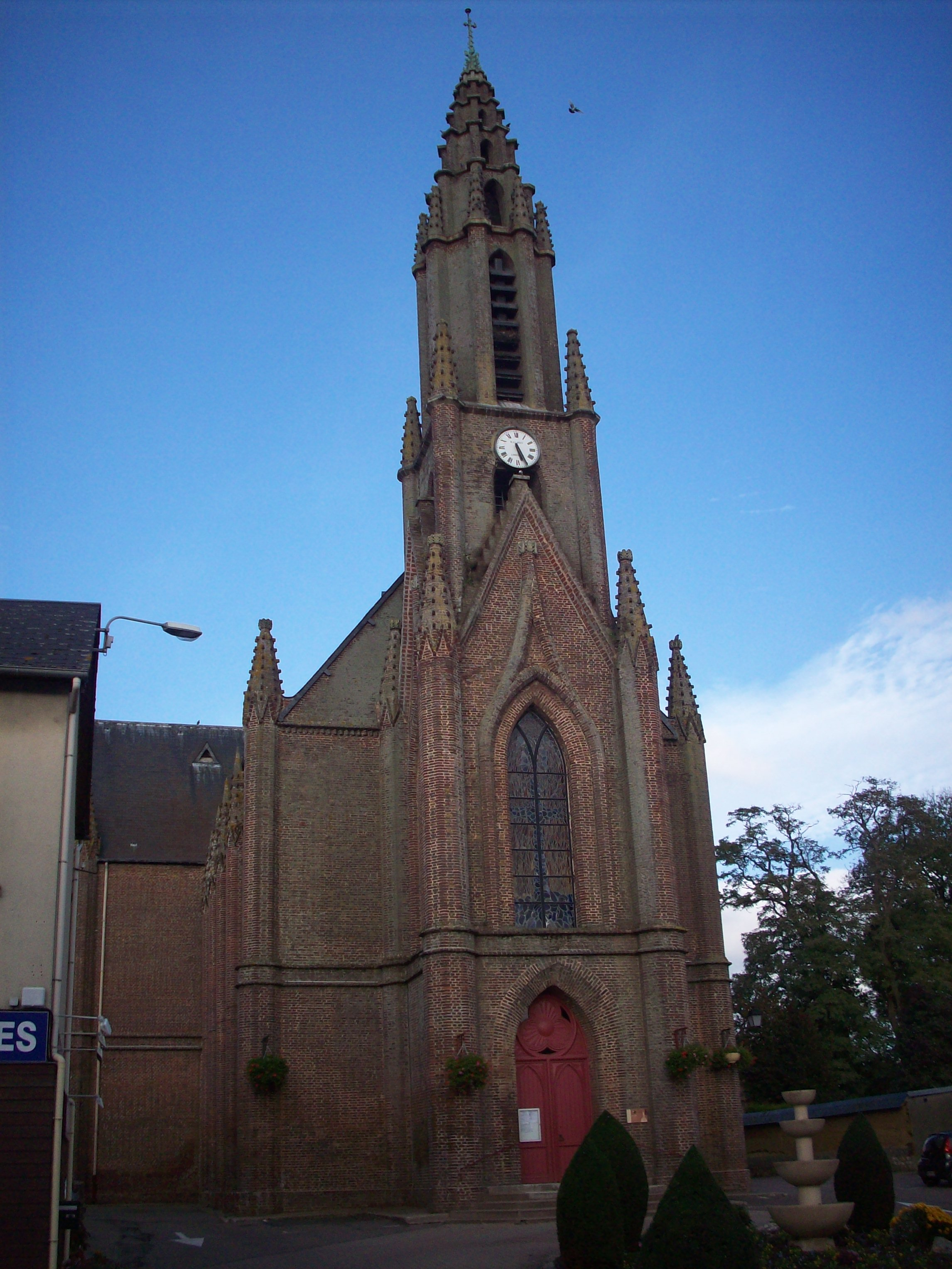 Eglise Notre-Dame-de-la-Vallée, de Fleury-sur-Andelle.